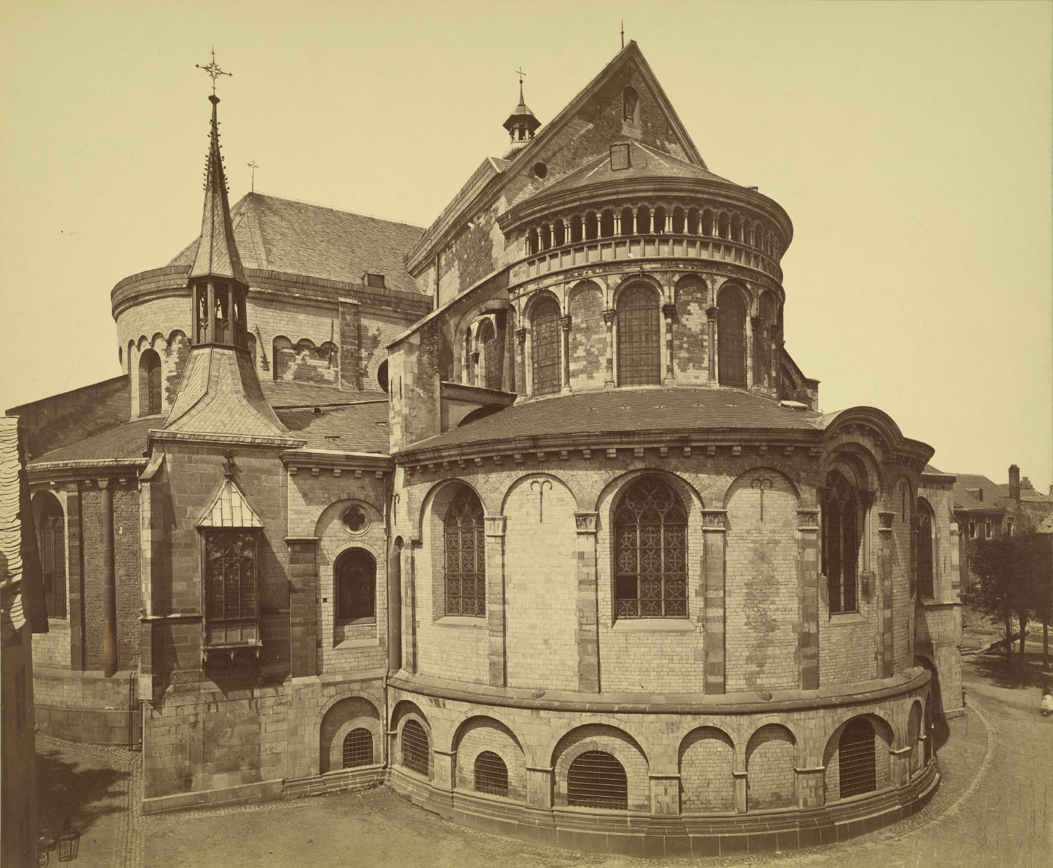 Cologne. Sankt Maria im Kapitol. Photograph date: ca. 1865-ca. 1880. Building Date: ca. 900-1065